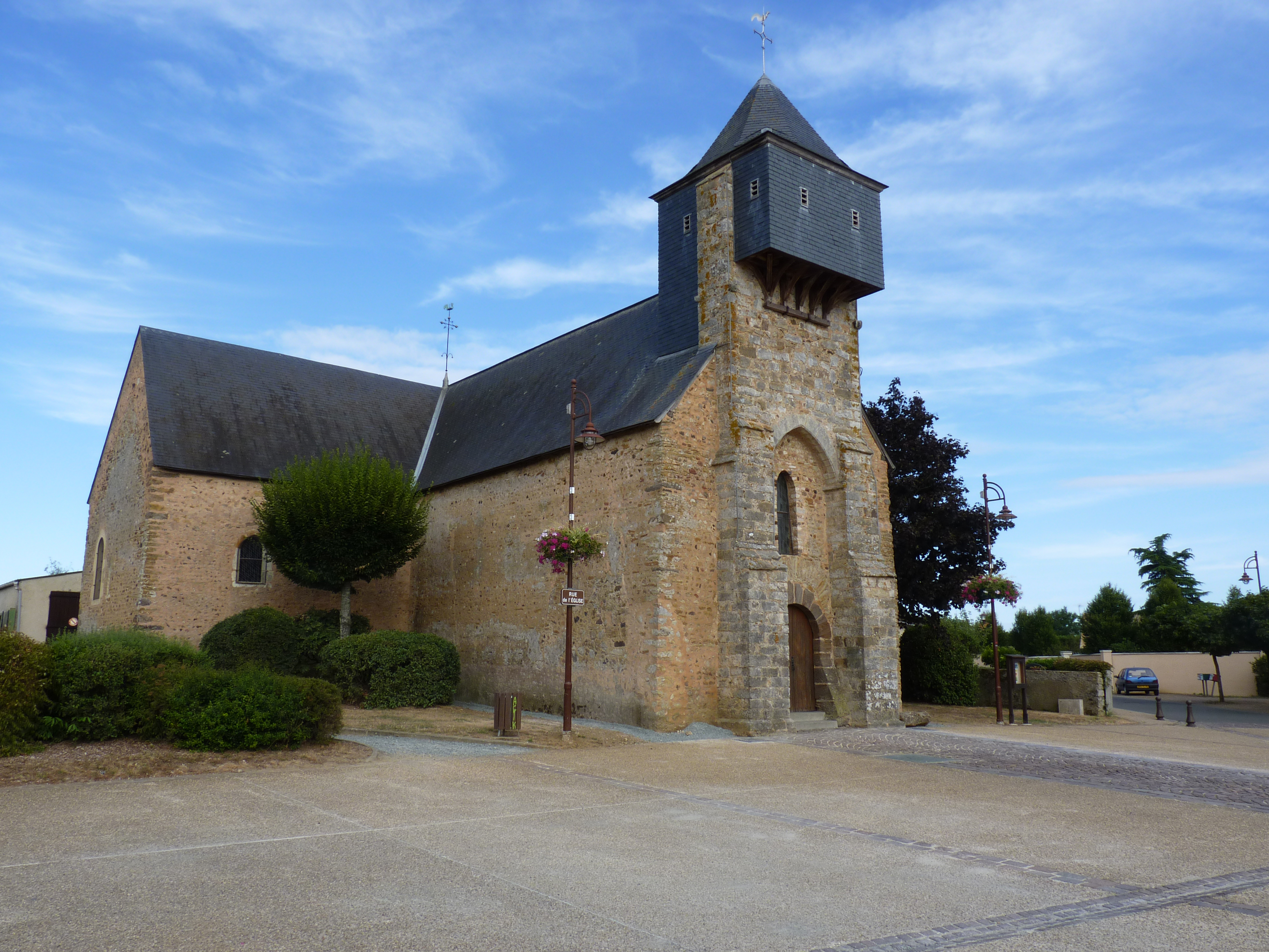 Sarthe - Joué l'Abbé - Eglise Saint Denis